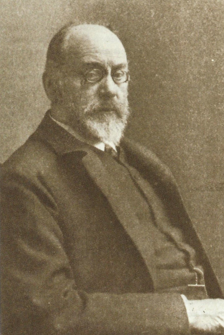 Fotografie von Anton von Frisch